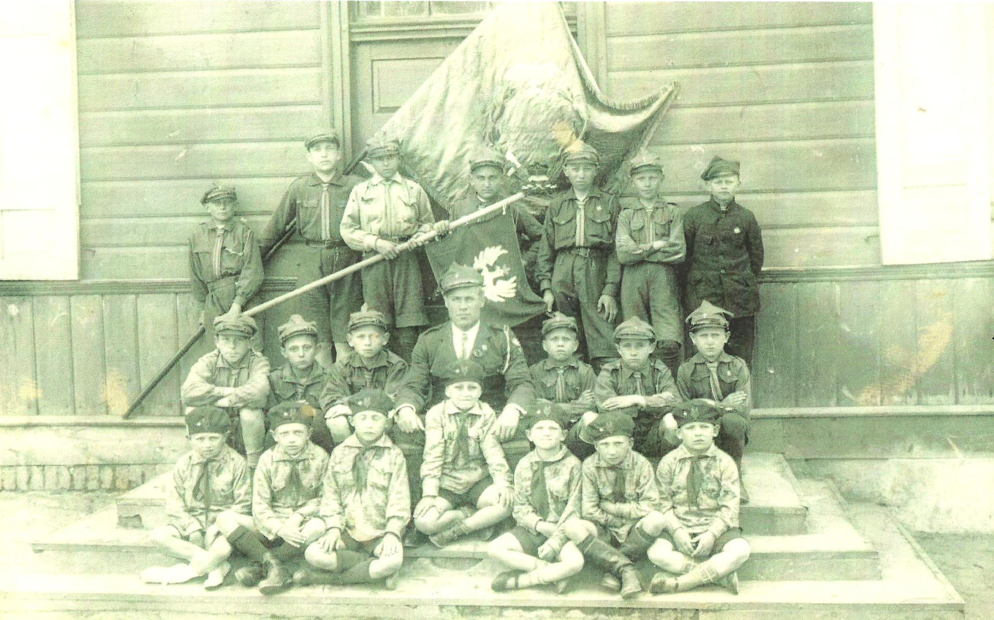 Zdjęcie Michała Woźniaka